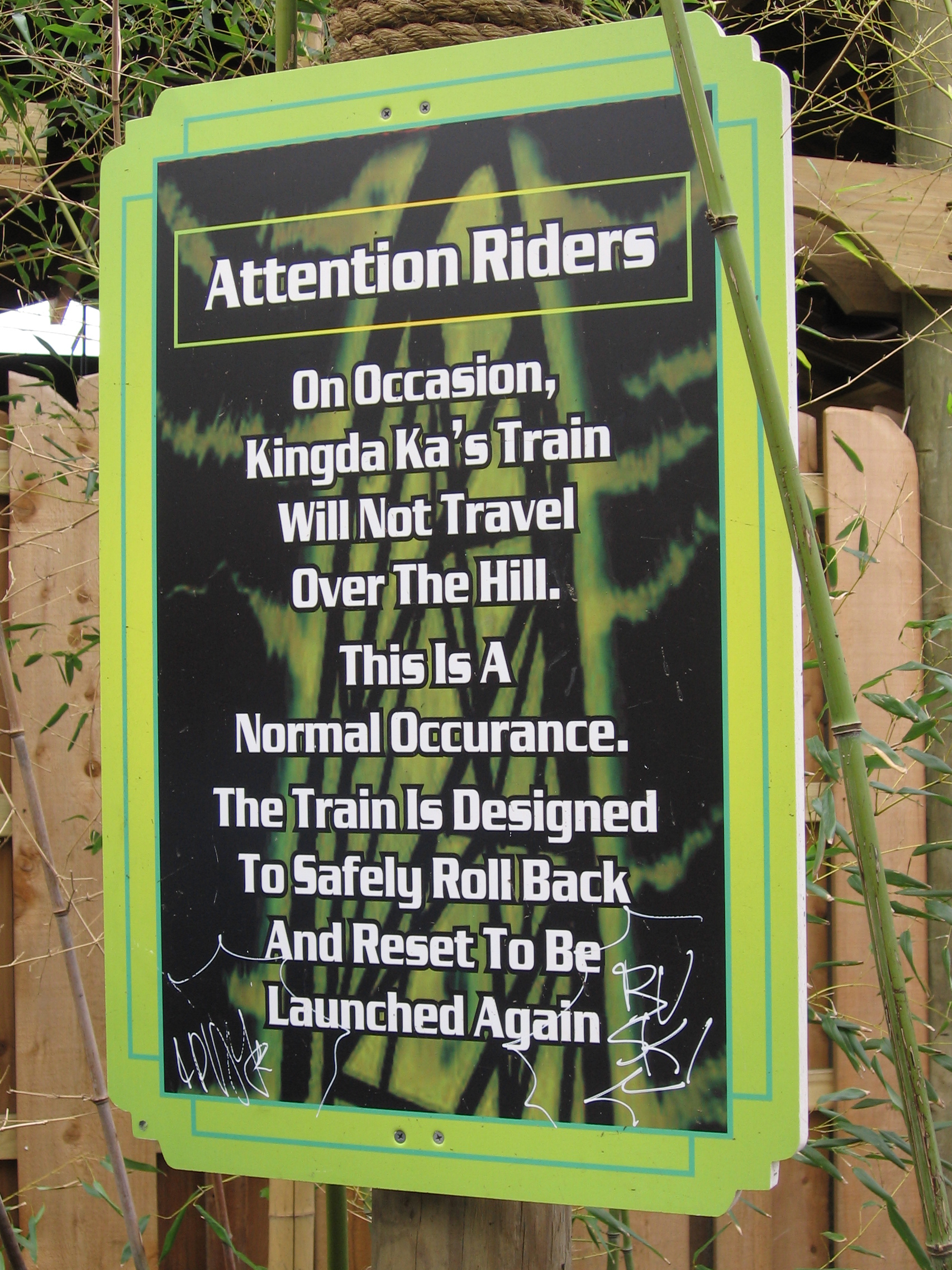 Took it myself. Dusso Janladde 04:16, 2 April 2006 (UTC)